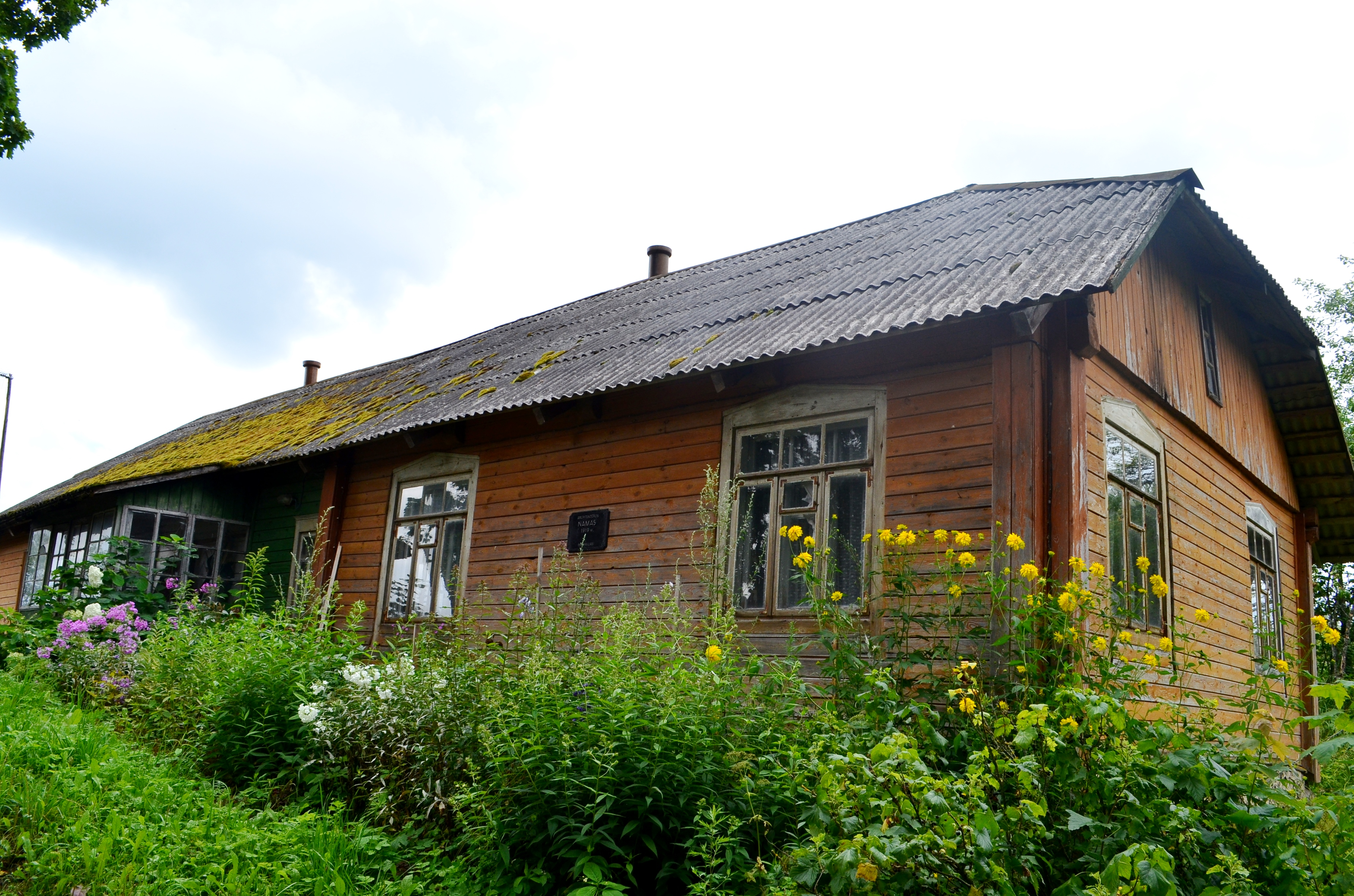 Pirkia, Salų (II) k., Ignalinos raj.